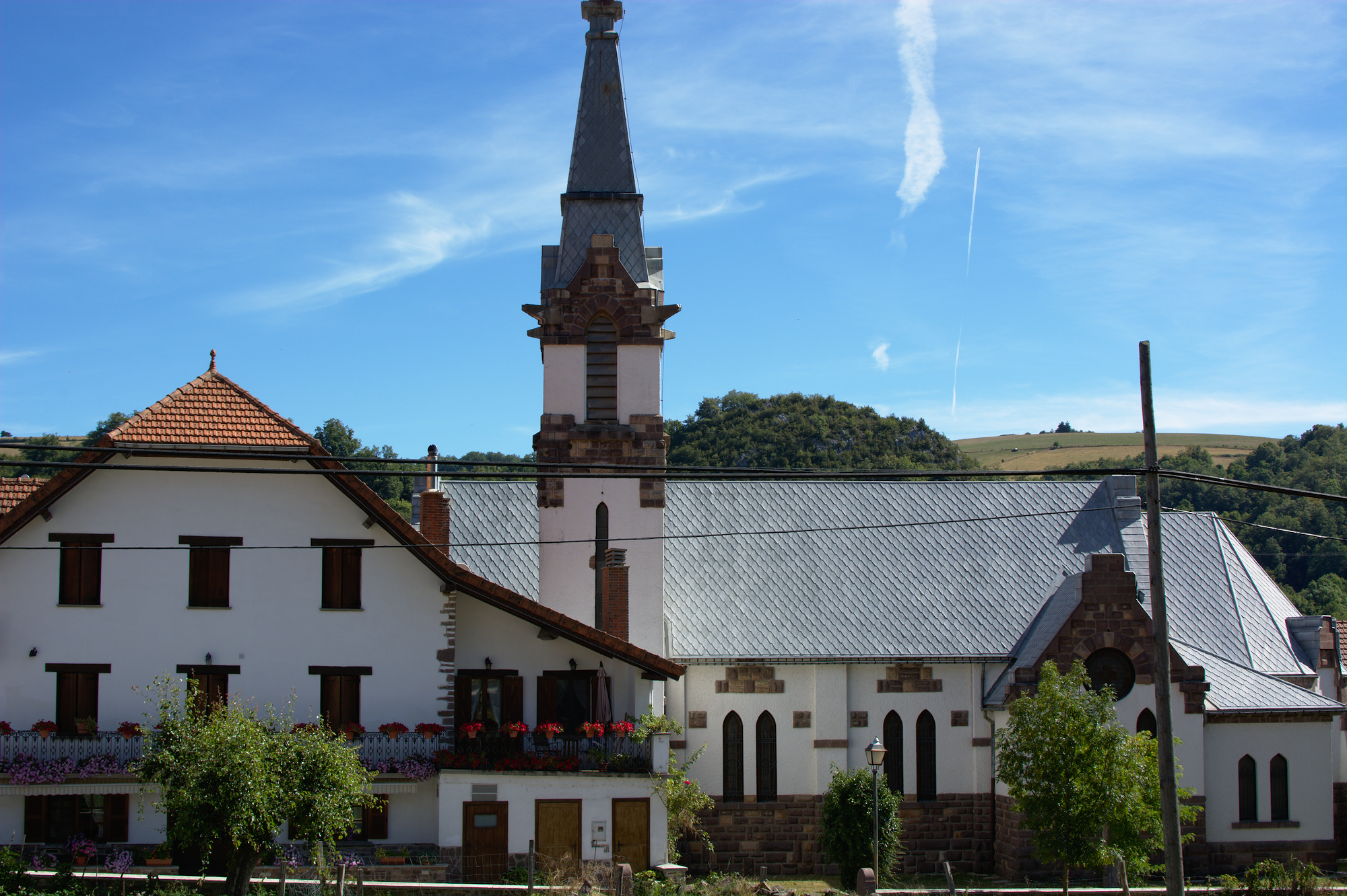 Municipios sin fotografía